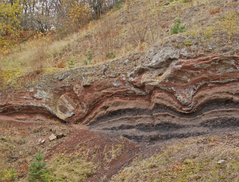 Einschlag vulkanischer Bomben mit Verformung der Erdschichten nahe Boos/Vulkaneifel